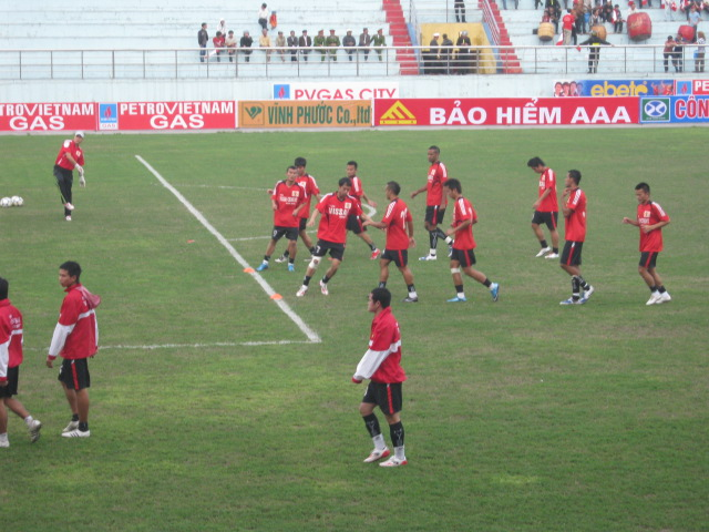 câu lạc bộ bóng đá Xi măng The Vissai Ninh Bình mùa giải 2010